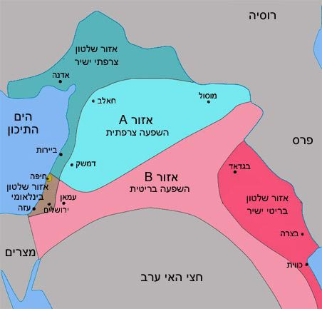 carte du découpage du Moyen-Orient suivant les accords Sykes-Picot.